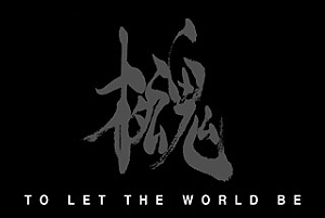 Logo di Philanthropy, organizzazione immaginaria della serie di videogiochi Metal Gear